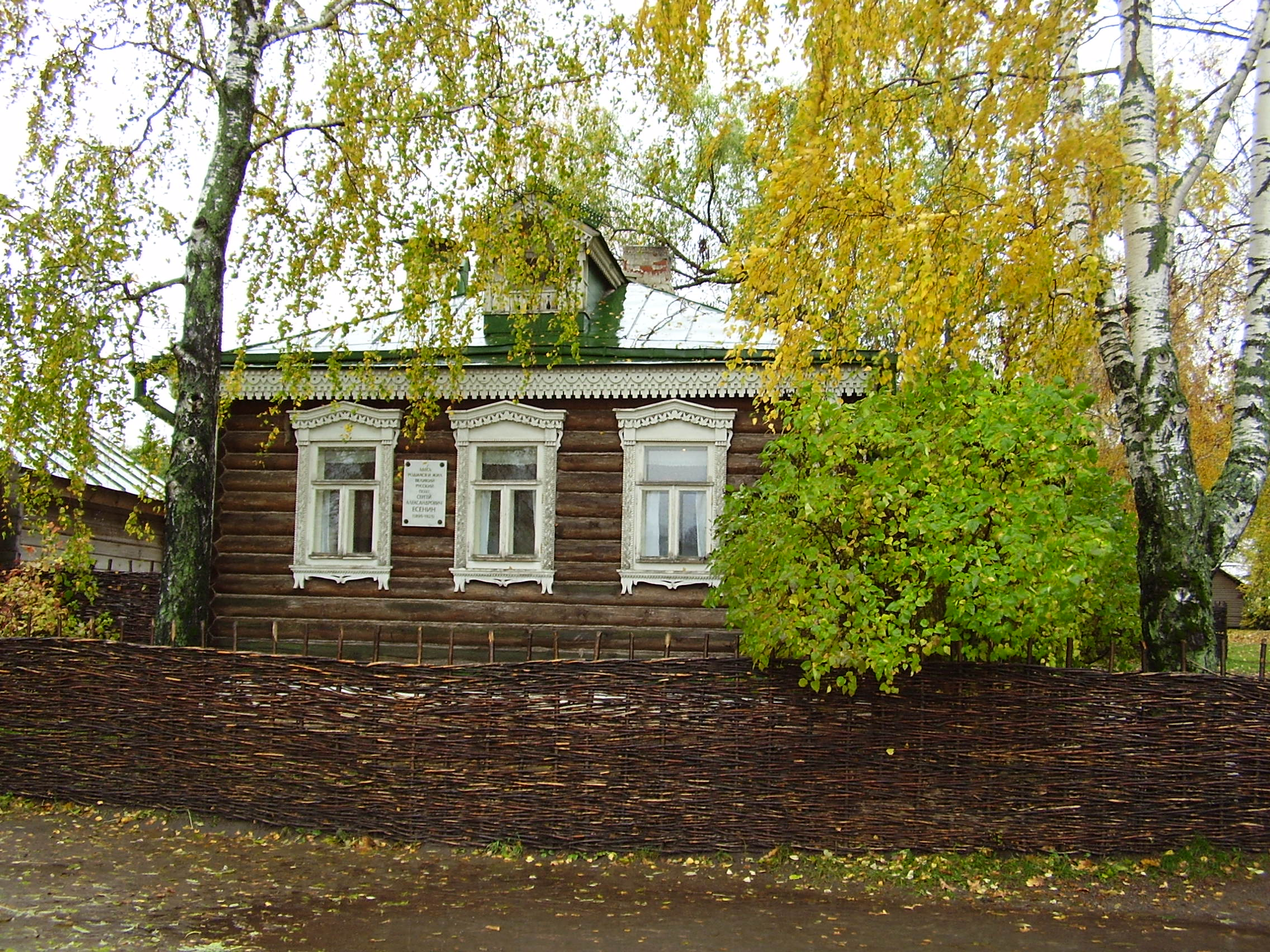 Дом-музей С.А. Есенина. Константиново.